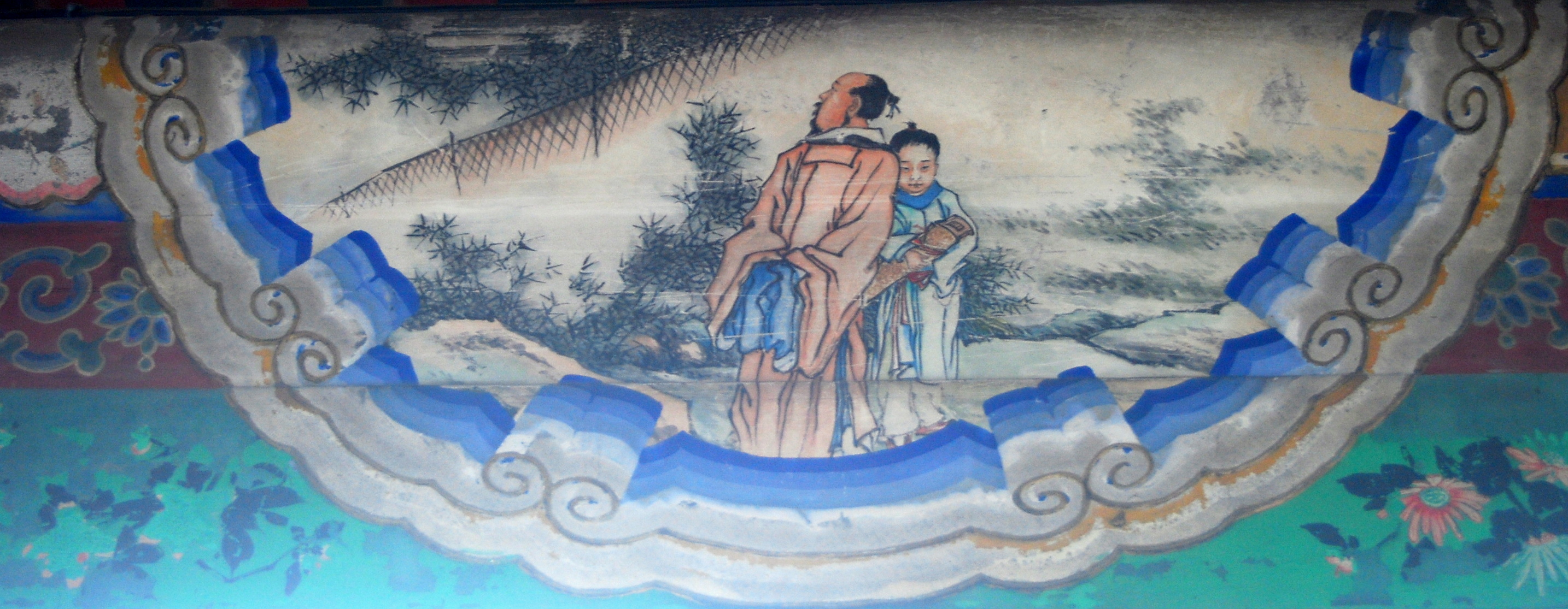 颐和园长廊上的彩绘：子猷爱竹